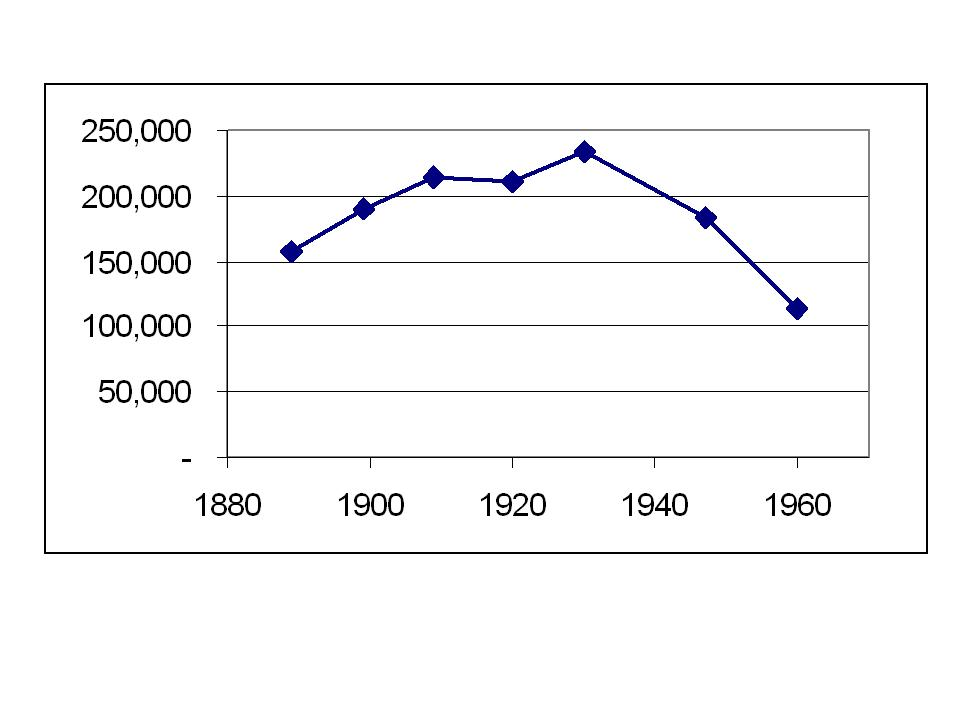 Garfiek van aantal vrouwelijk huishoudelijk personeel 1889-1960, ontleend aan diverse CBS publicaties